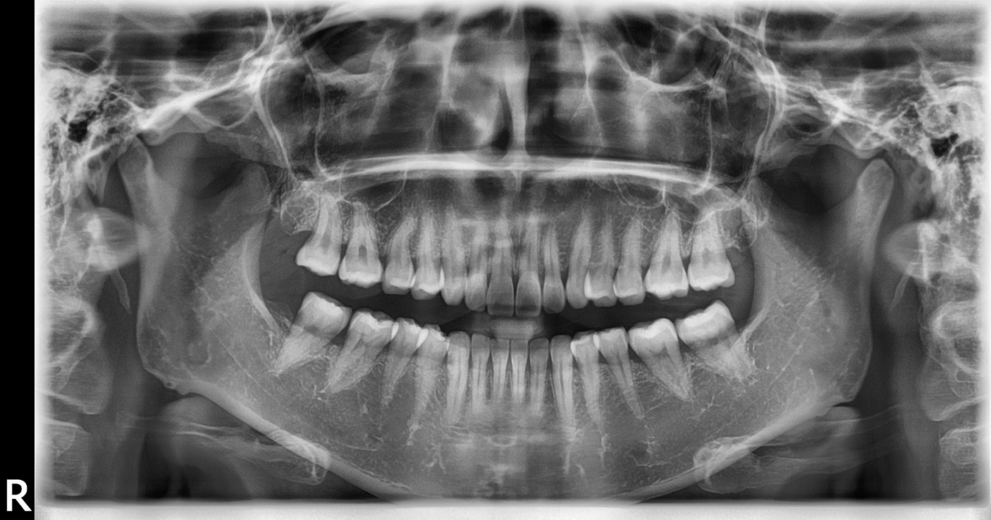 Ortopantomografía